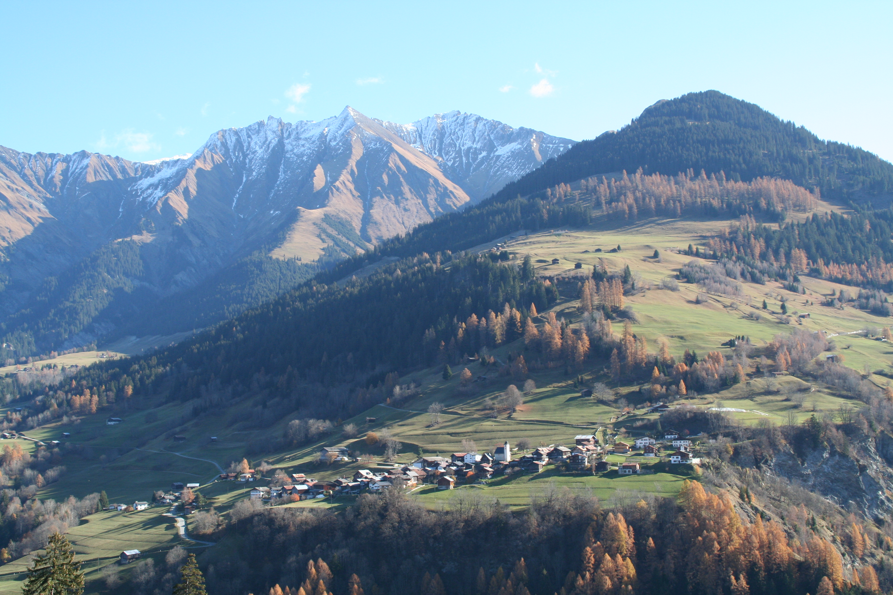 Pitasch